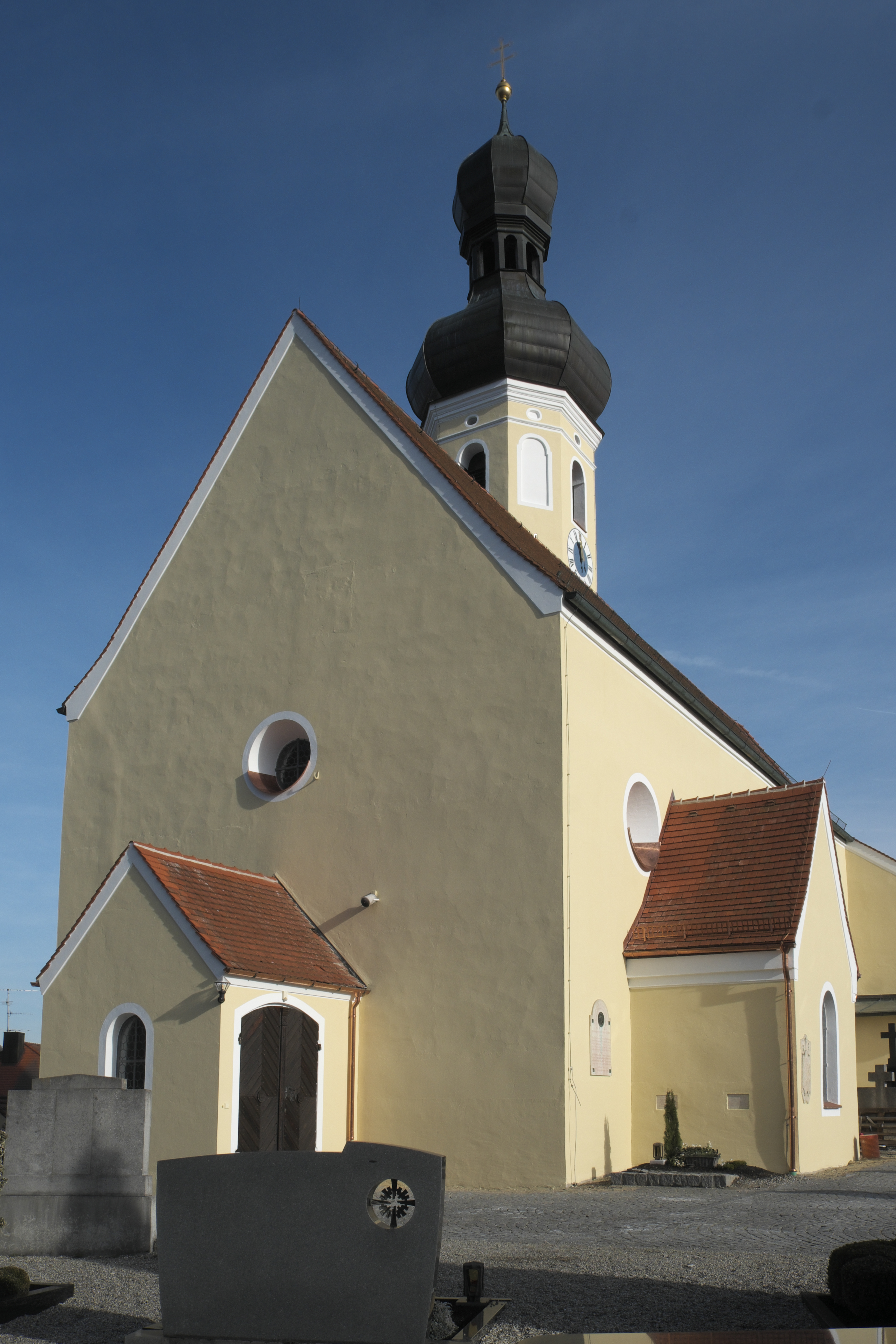 Katholische Pfarrkirche Mariä Heimsuchung in Gosseltshausen (Wolnzach) im Landkreis Pfaffenhofen an der Ilm (Bayern/Deutschland)